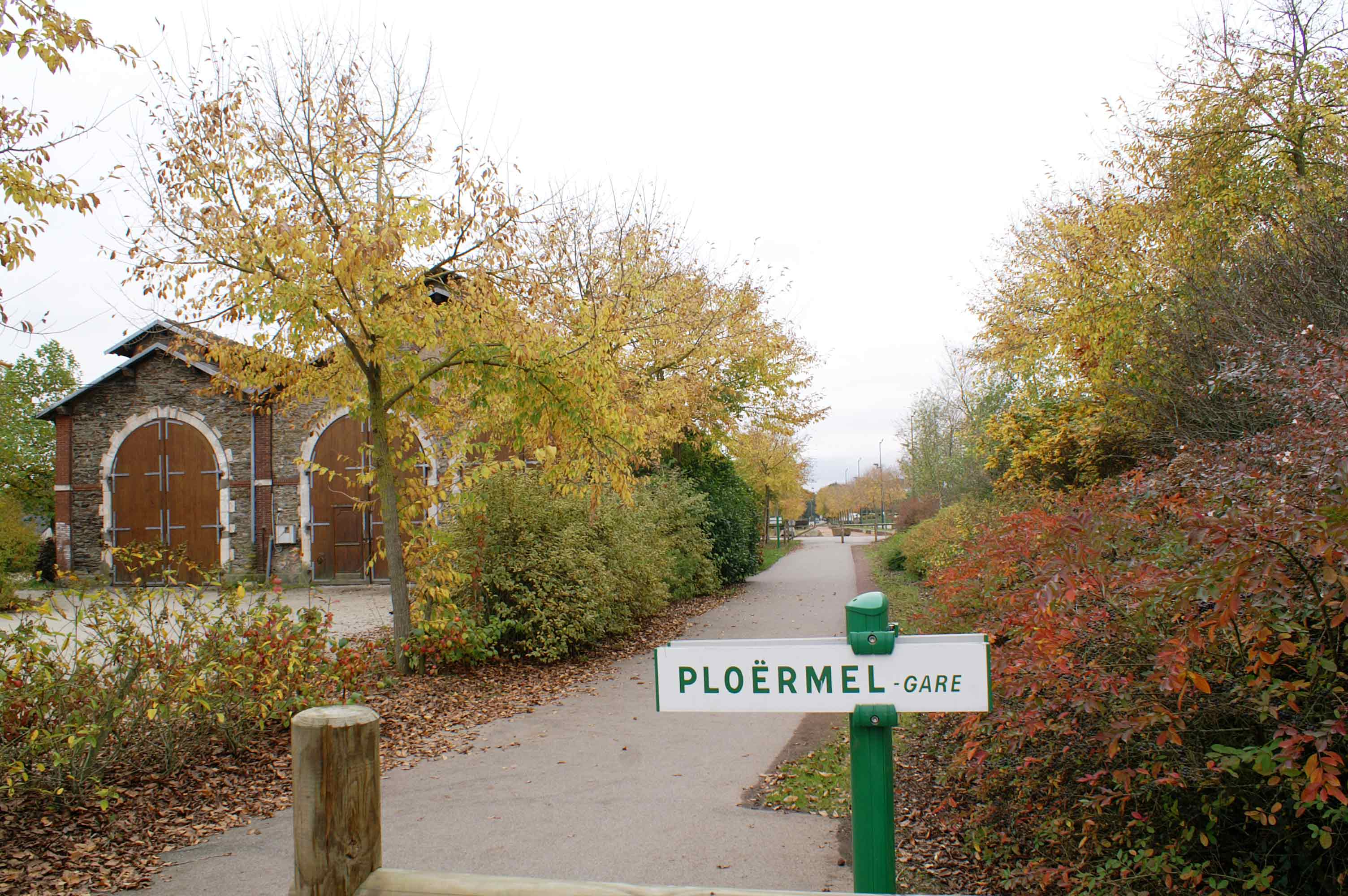 Gare de Ploërmel, dépôt et la voie verte ayant remplacé la voie ferrée. La nouvelle signalisation gare de Ploërmel.